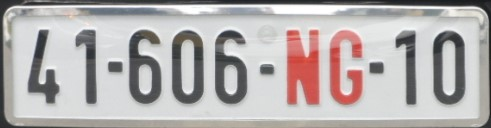 CD plaat Vietnam